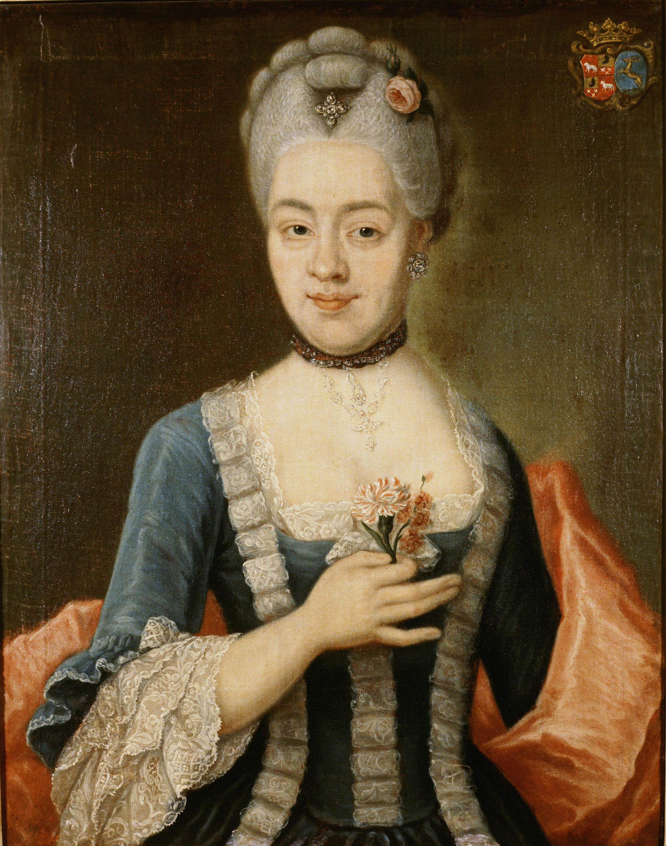 Antonia Forsten echtgenote van Tonco Modderman, Gronings industrieel en patriot